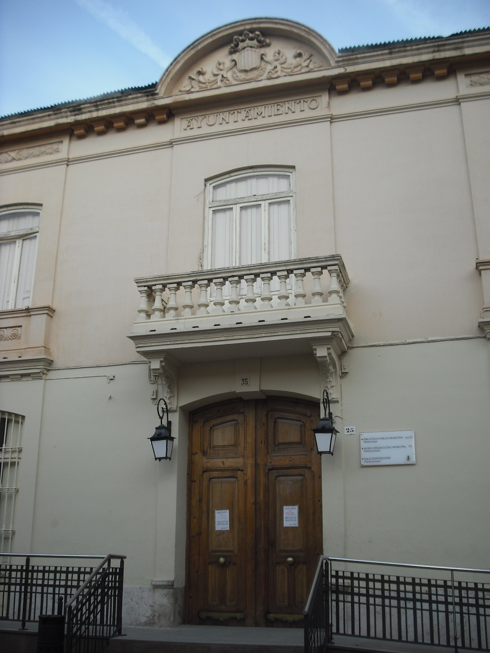 Antiguo ayuntamiento de Moncada, sede de la biblioteca municipal y el museo arqueológico. .